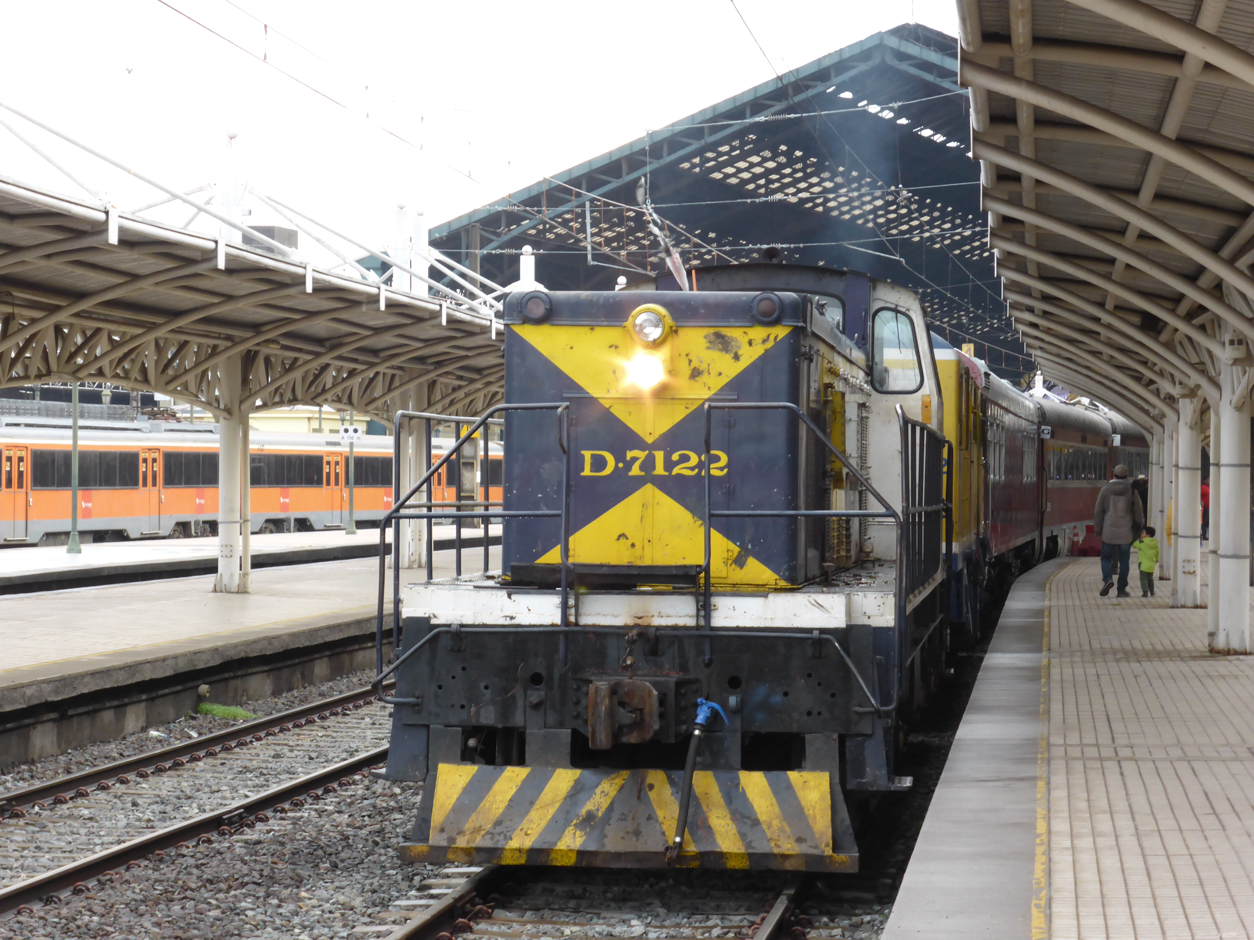 En la Estación Alameda (nombre oficial), o Estación Central (nombre popular), de Santiago de Chile, vemos a la derecha el "Tren del Recuerdo", encabezado por la locomotora diésel "D-7122", fabricada en Francia por "Brissonneau et Lotz" en el año 1962. A la izquierda vemos una unidad eléctrica fabricada en España, ex-Renfe serie 440, reformada. UT440, con el logotipo "TrenCentral. Grupo EFE", 127.